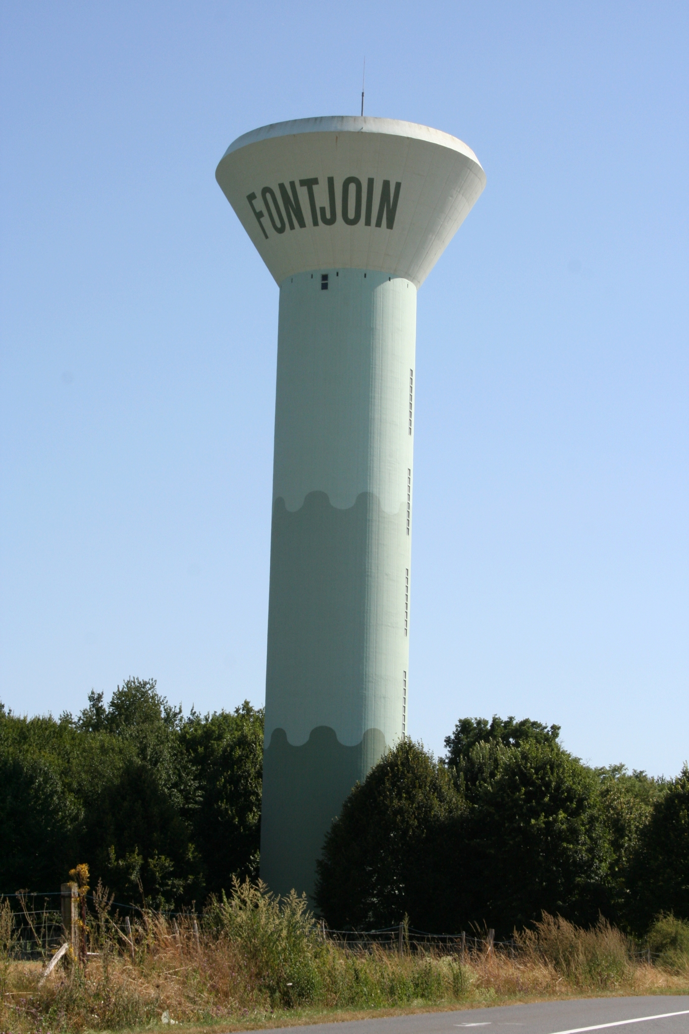 Château d'eau de la source de Fontjoin à Verrières, vienne, France